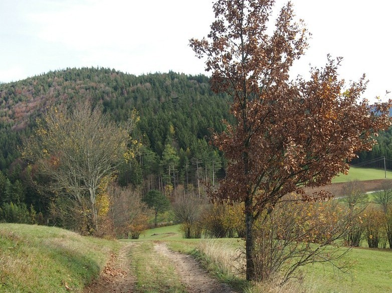 Der Große Kitzberg ist ein Berg im südlichen Niederösterreich zwischen dem Großen Neukogel im Südwesten und dem Piestingtal im Nordosten. Aufgenommen von der Ochsenheide